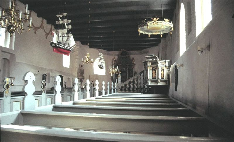 Sebber Kirke i Danmark. Skibet set mod øst